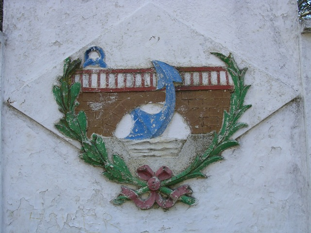 Ministerio de Obras Públicas (España) - En una fuente cercana a (Zamora)